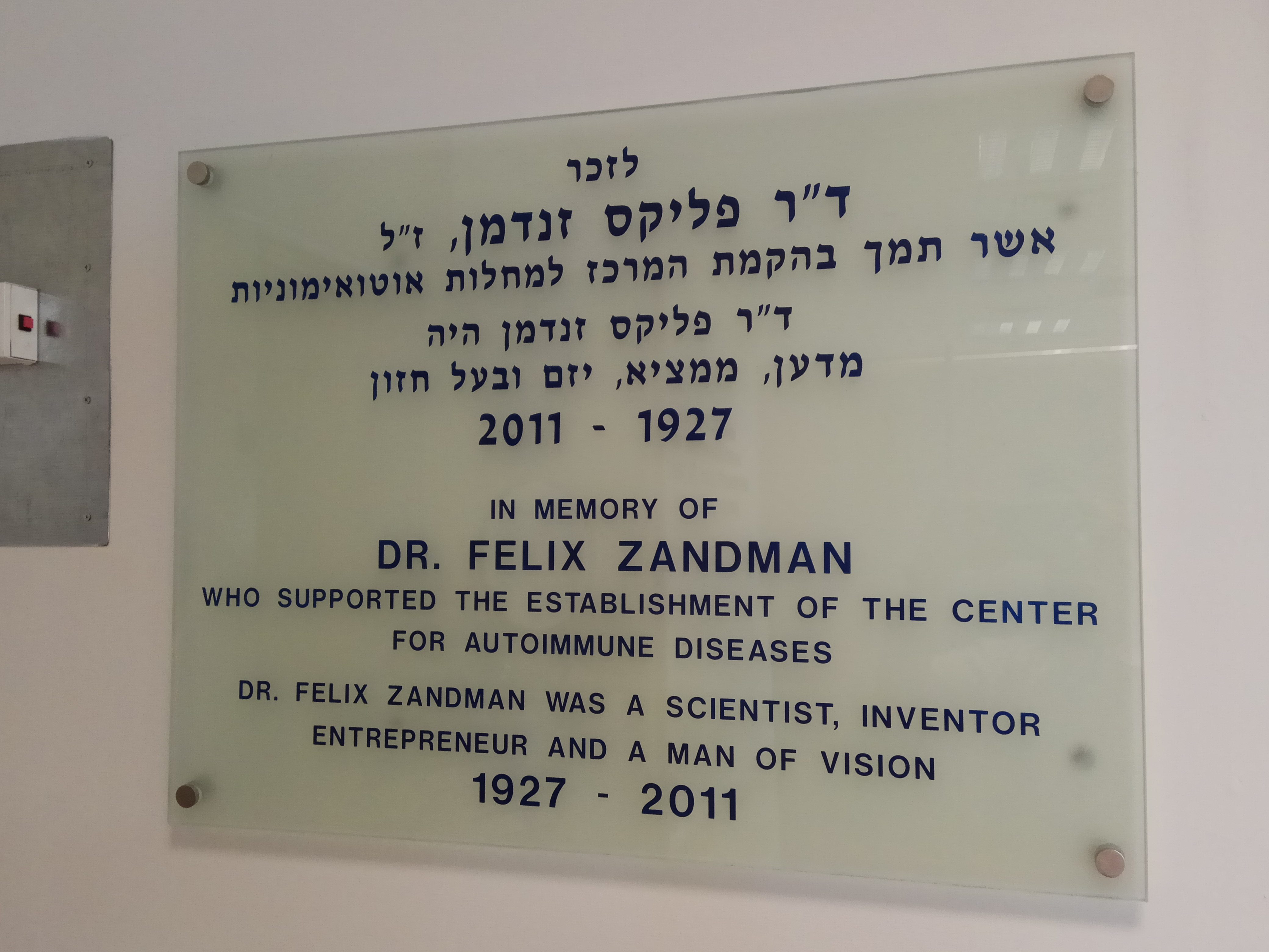 לוח הקדשה לפליקס זנדמן במכון למחלות אוטואימוניות במרכז רפאי שיבא - תל השומר